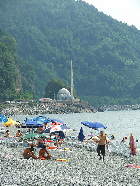 სარფი / Sarpi Sakartvelo / Turkey